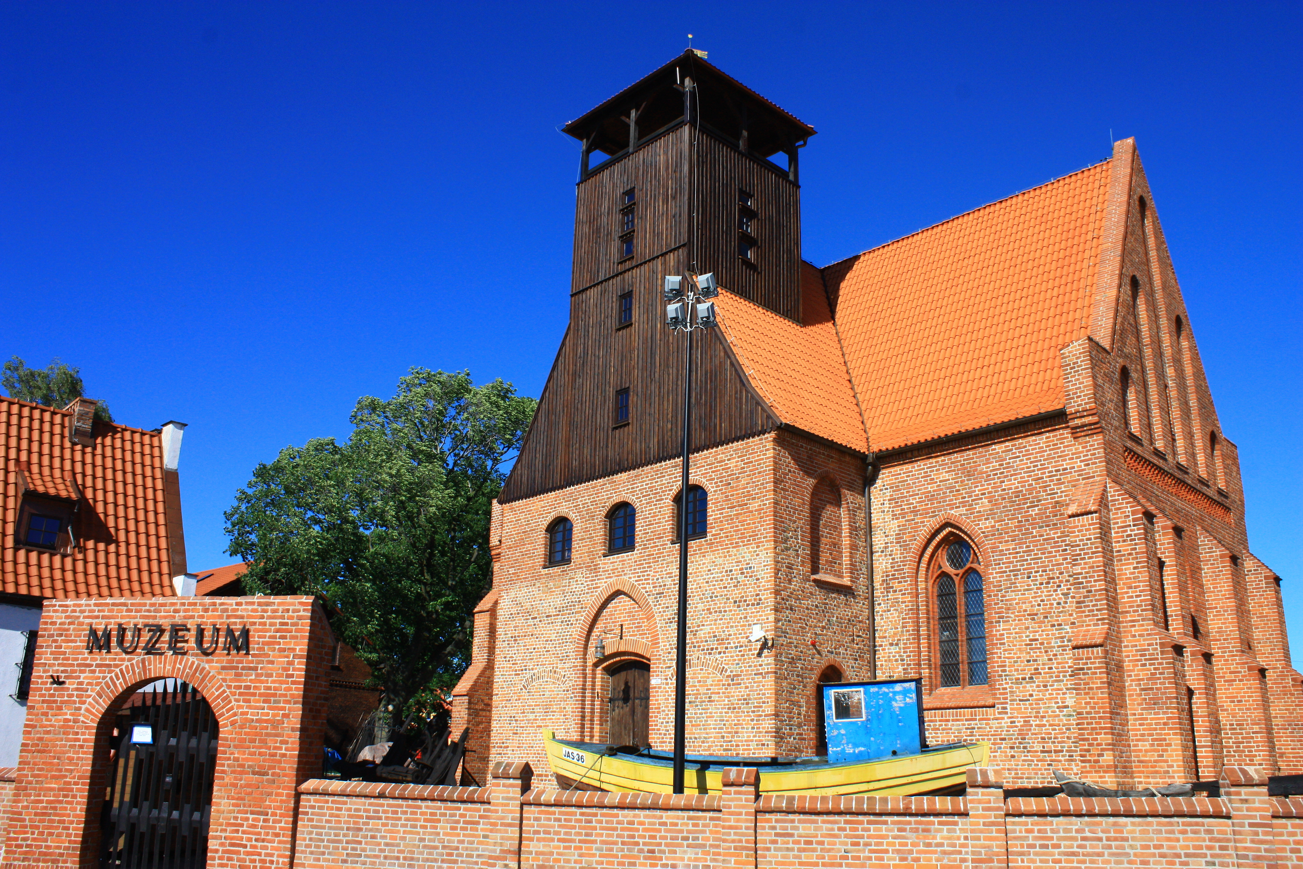 Hel, kościół p.w. śś. Piotra i Pawła, ob. Muzeum Rybołówstwa, XIV, XV